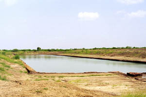 vue du bassin de Lothal, Inde, site de la civilisation de l'Indus.